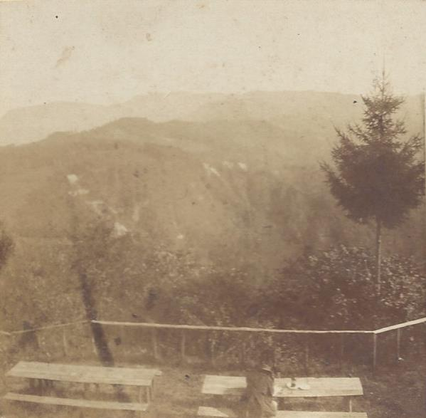 Linke Hälfte der Stereokarte N° 337 Vue Prise sur le Mont Hütliberg point cuminant de la chaine de l'Albis à Zurich, von Henri-Charles Plaut, 1859.